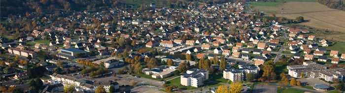 Vue aérienne de la ville d'Aubevoye